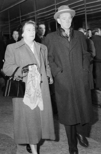 Klingenberg kino, premiere på Olympiafilmen, gjester, ankomst, statsråd.